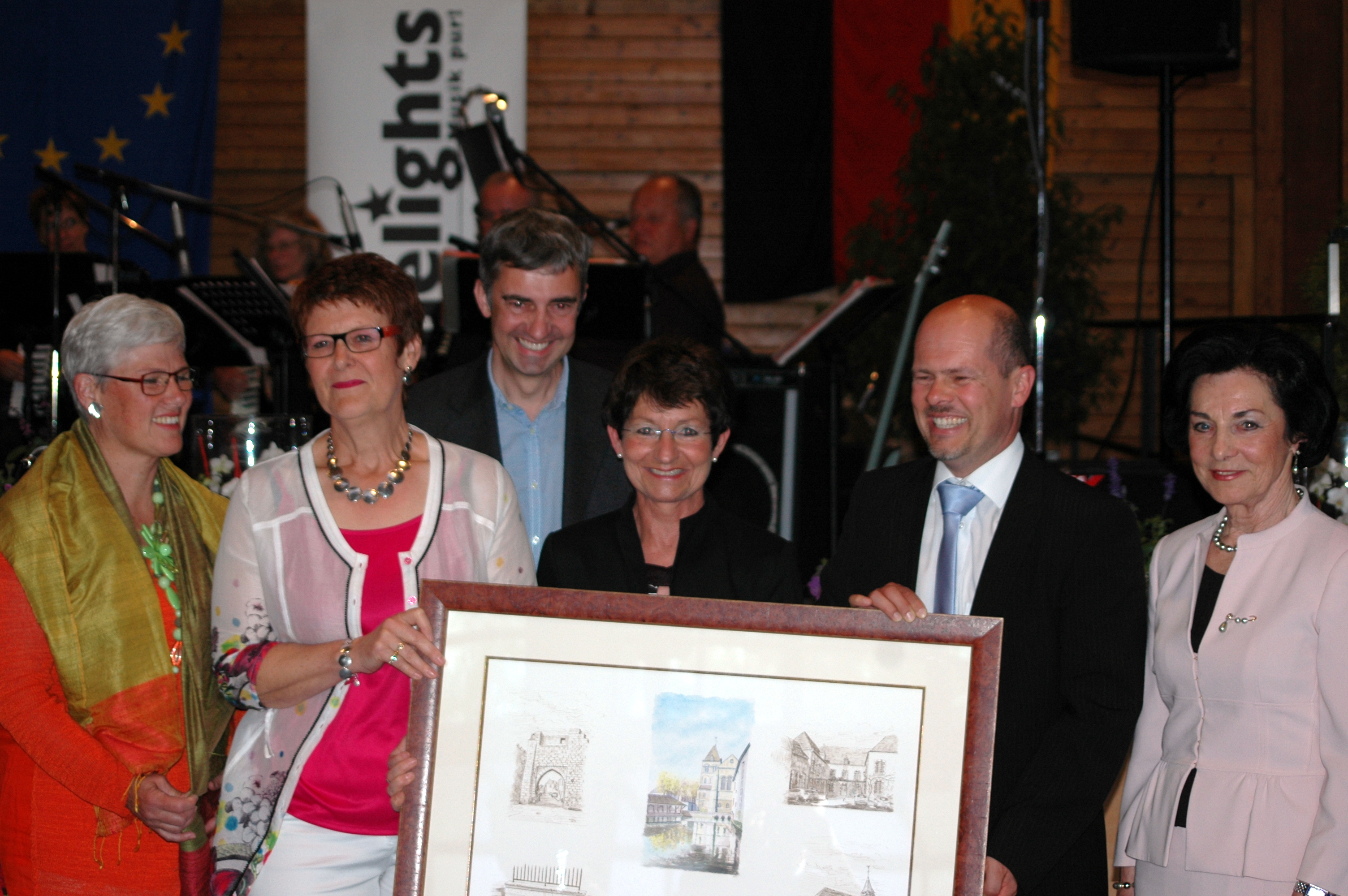 48. Jahre Partnerschaft Vertus - Bammental